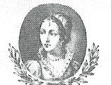 Elżbieta Węgierska